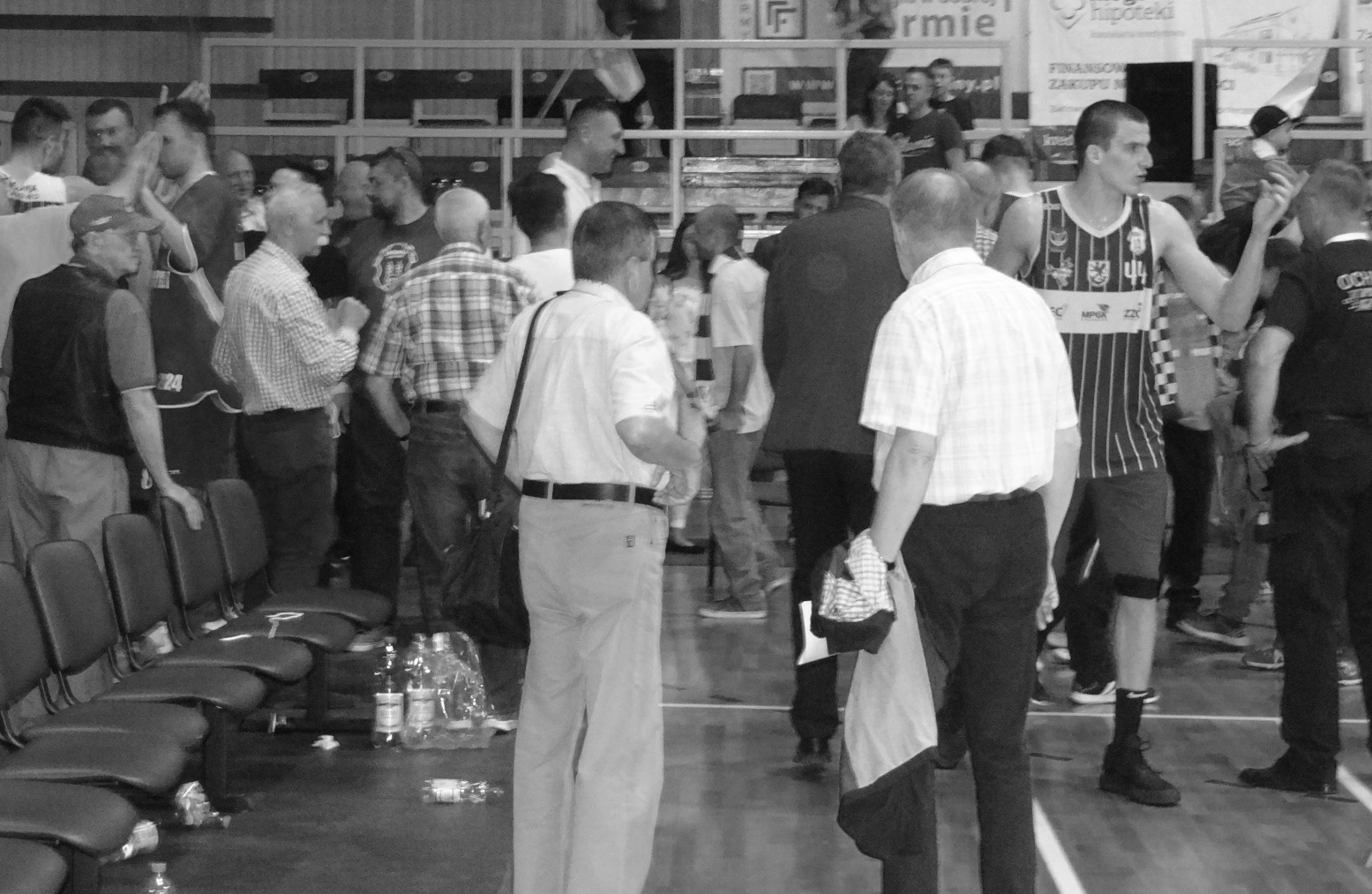 Kierownik KS Spójnia Wiśniewski